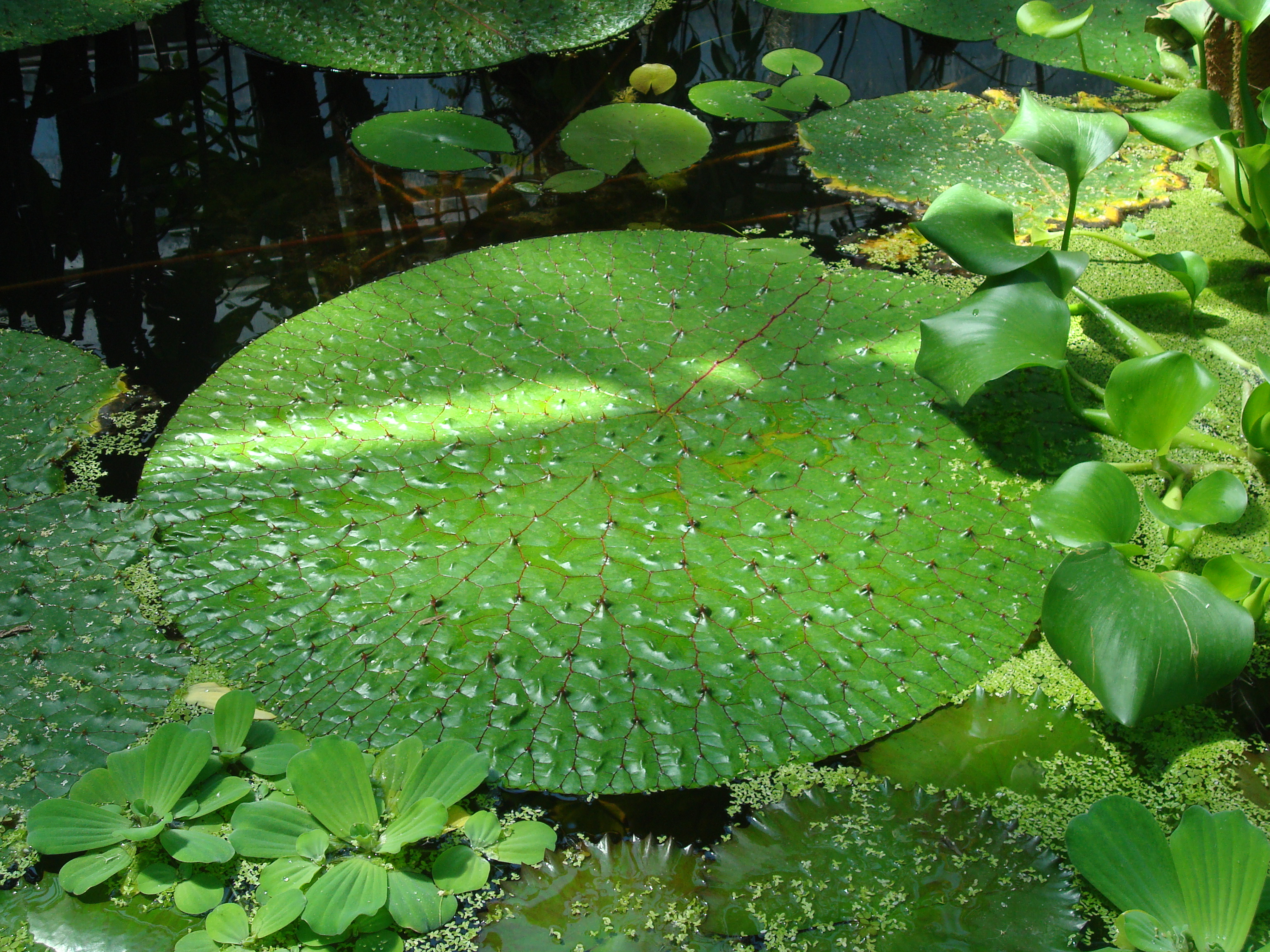 Nénuphar Epineux, "Euryale Ferox" (Parc Botanique du Montet, Nancy, France)